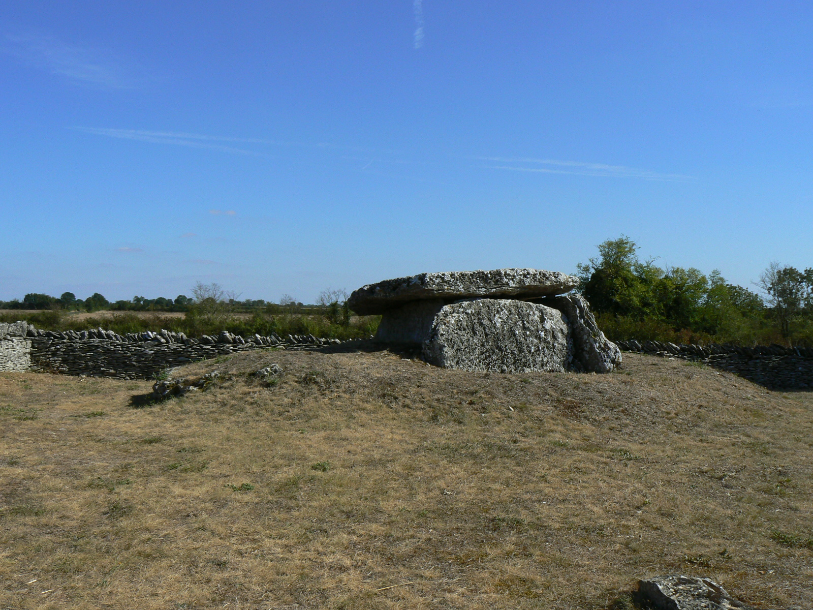 Dolmen des Sept Chemins, La Pierre Levée (Classé, 1971)